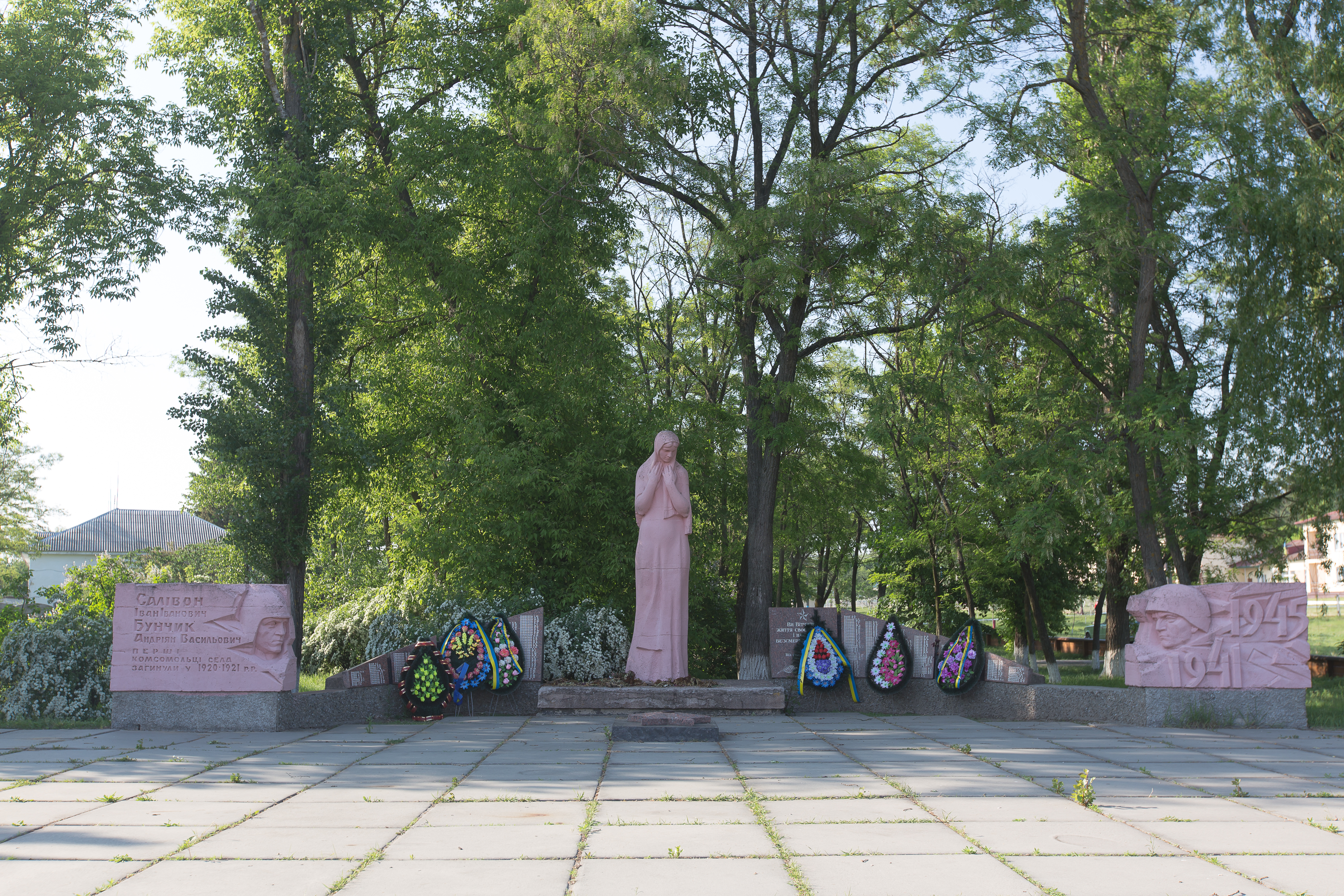 Пам'ятник Загиблим у Великій Відчизняній Війні. с. Сошників. Бориспільської районної Ради Київської області.